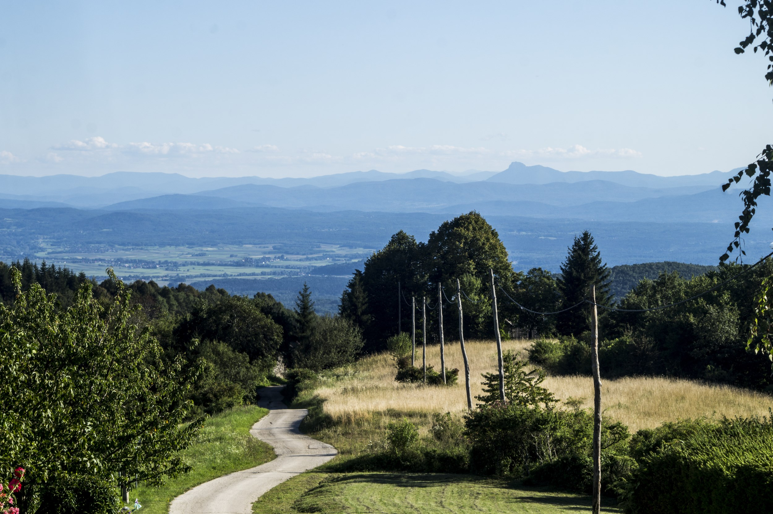 Sekulići, view to Klek